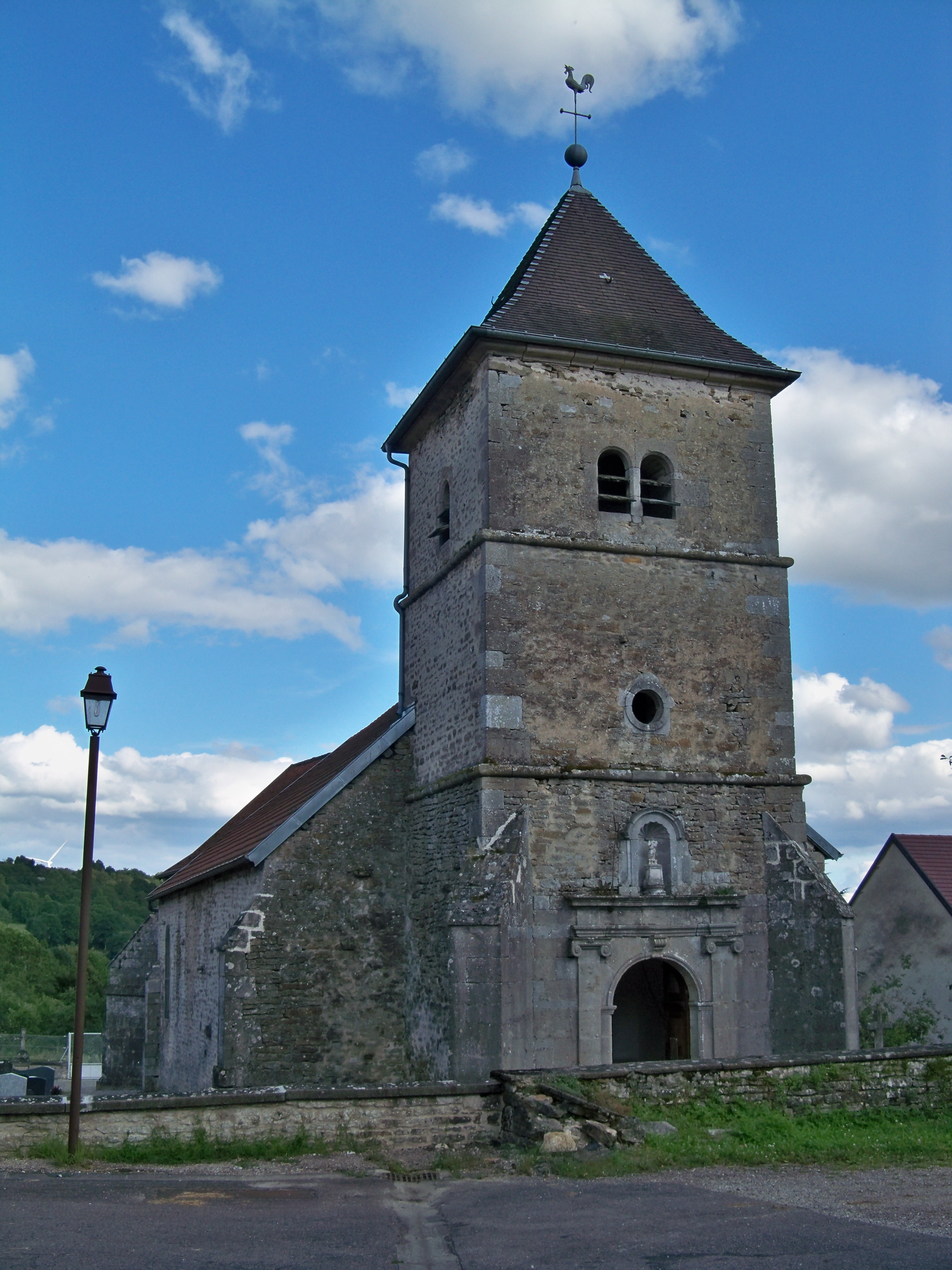 église de Flagey (52)